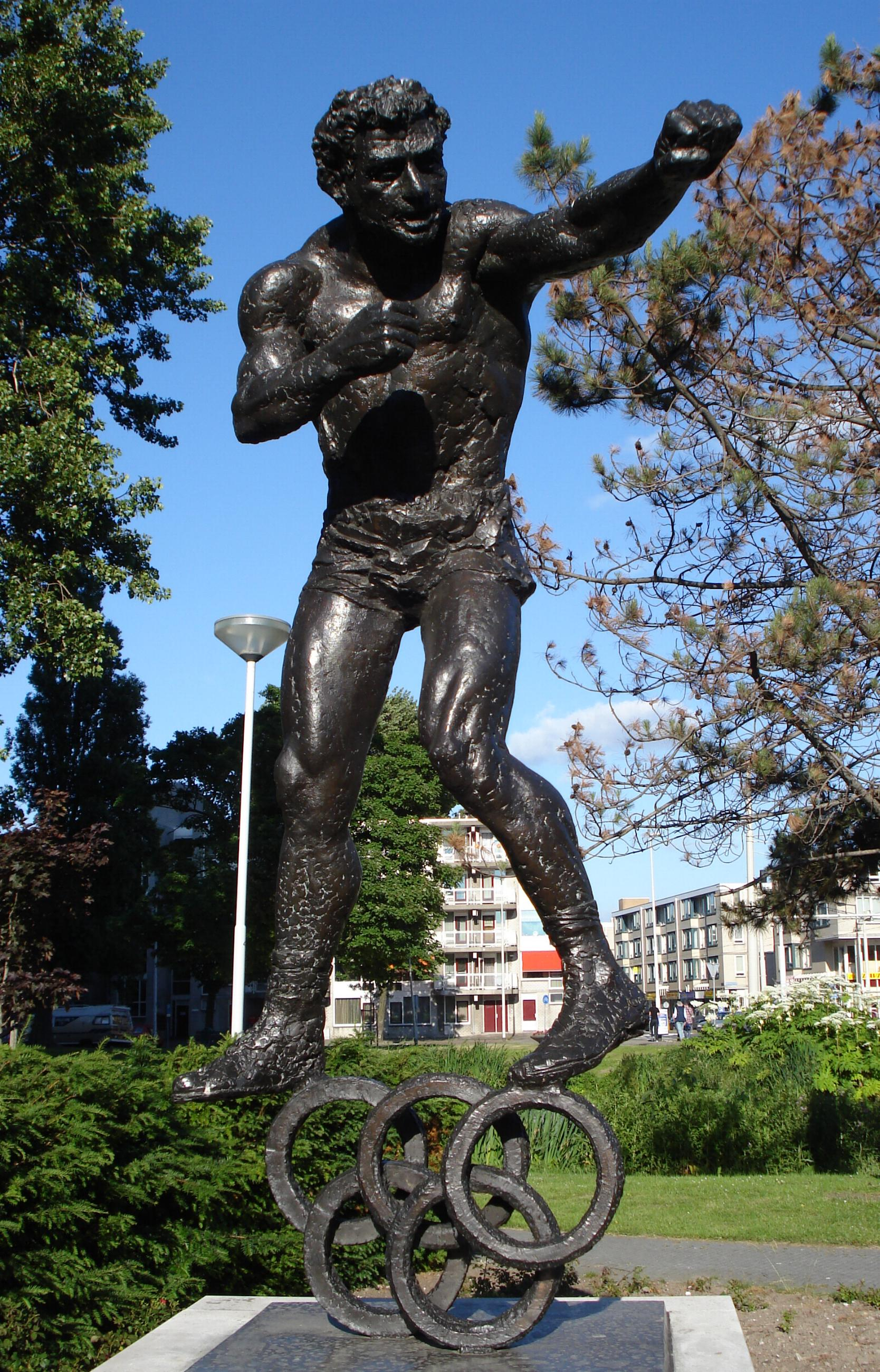 Rotterdam, Goudse Rijweg. Standbeeld boxer Bep van Klaveren van Willem Verbon. Rotterdam/The Netherlands